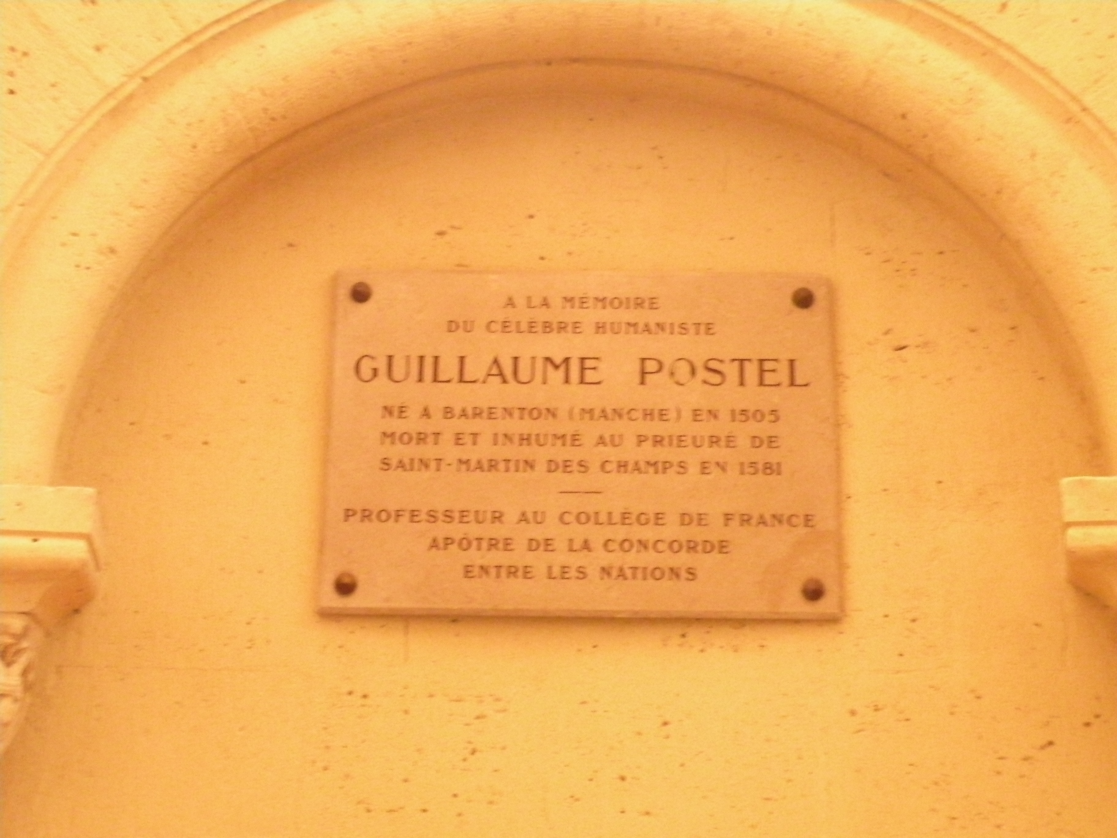 Interior of Prieuré Saint-Martin-des-Champs